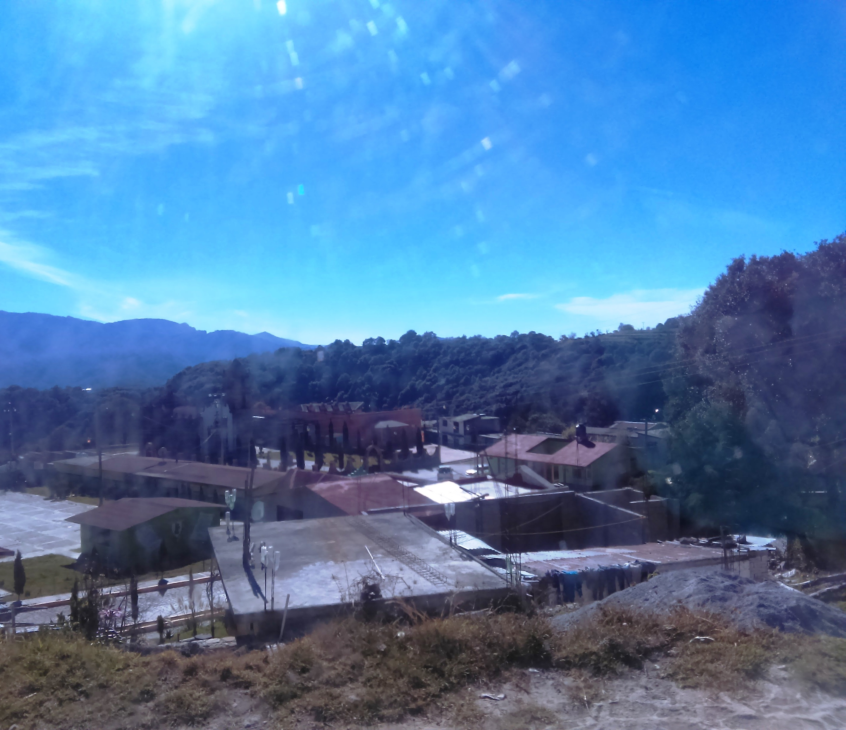 San Jerónimo, El Arenal, Hidalgo, México.